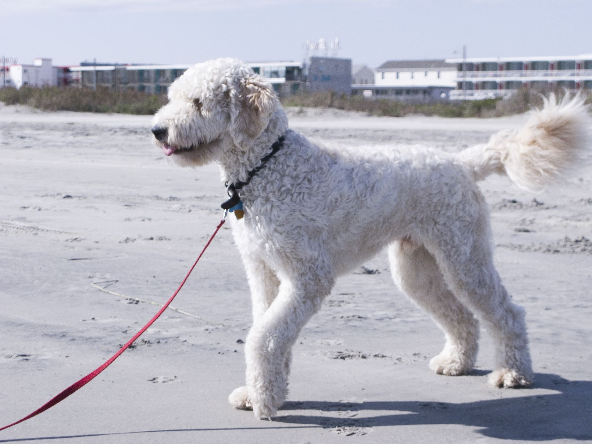 A male Goldendoodle (Golden Retriever/Poodle mix).